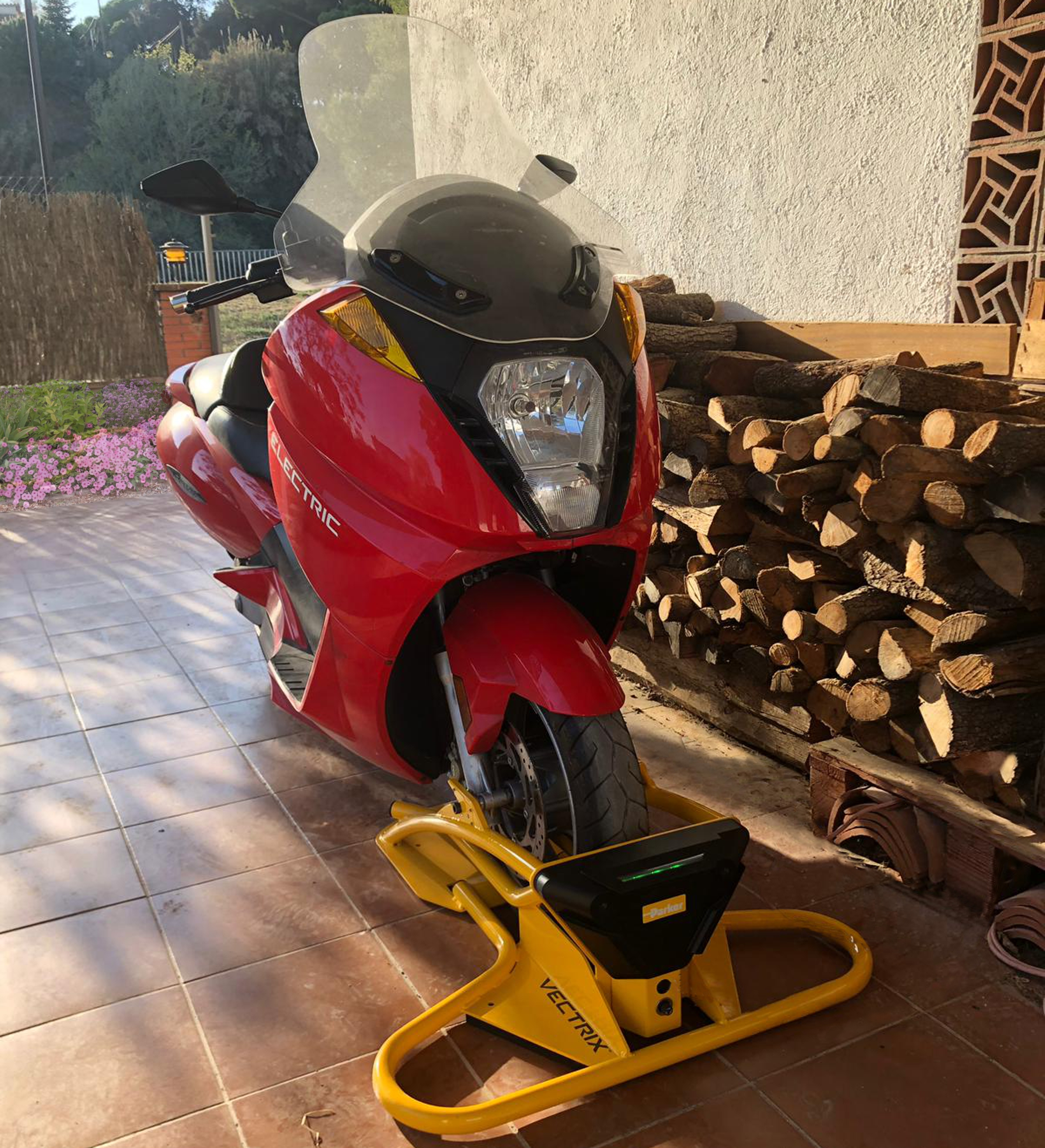 A 2019 Vectrix charging by dock base station.